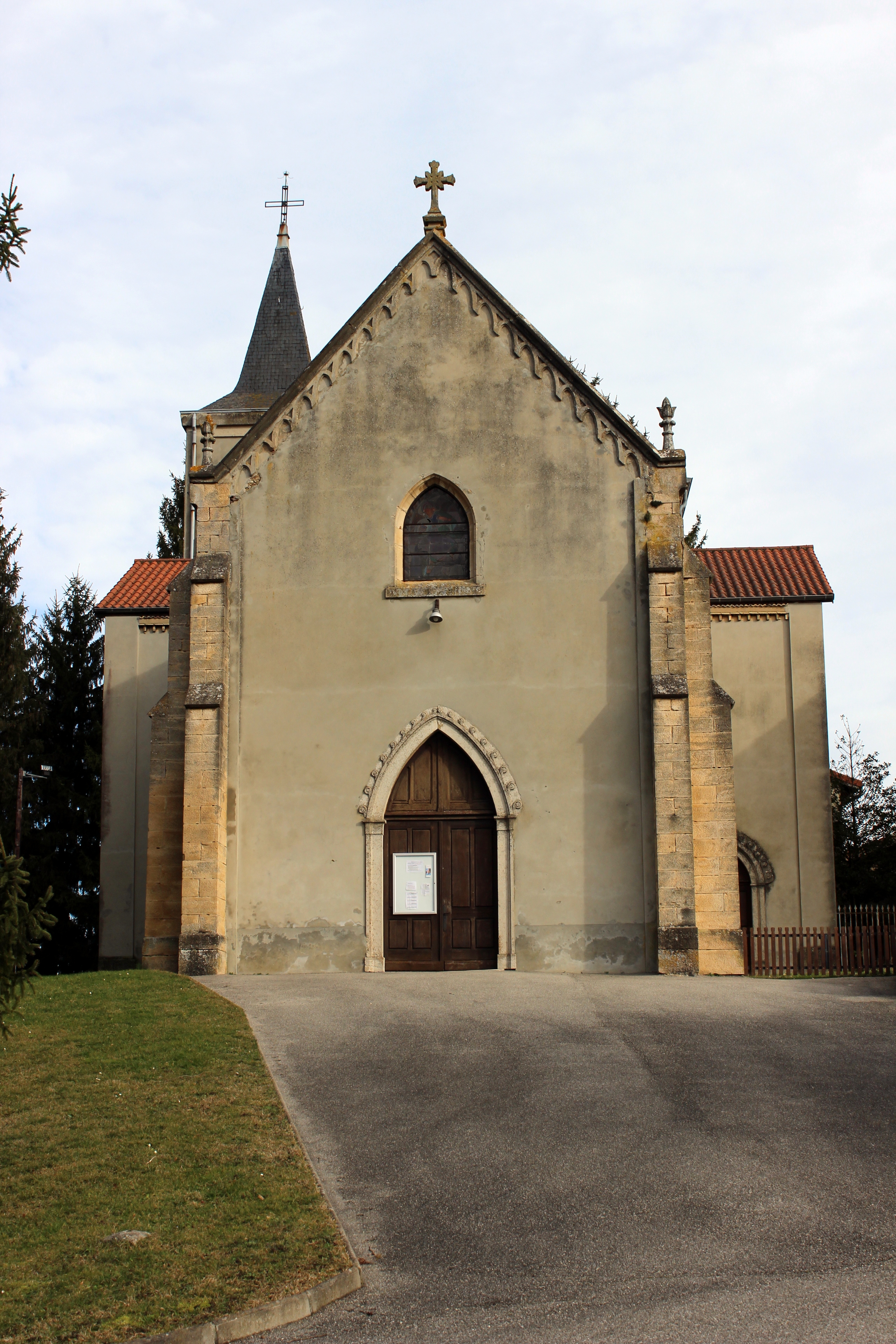 Eglise de Bonnefamille.